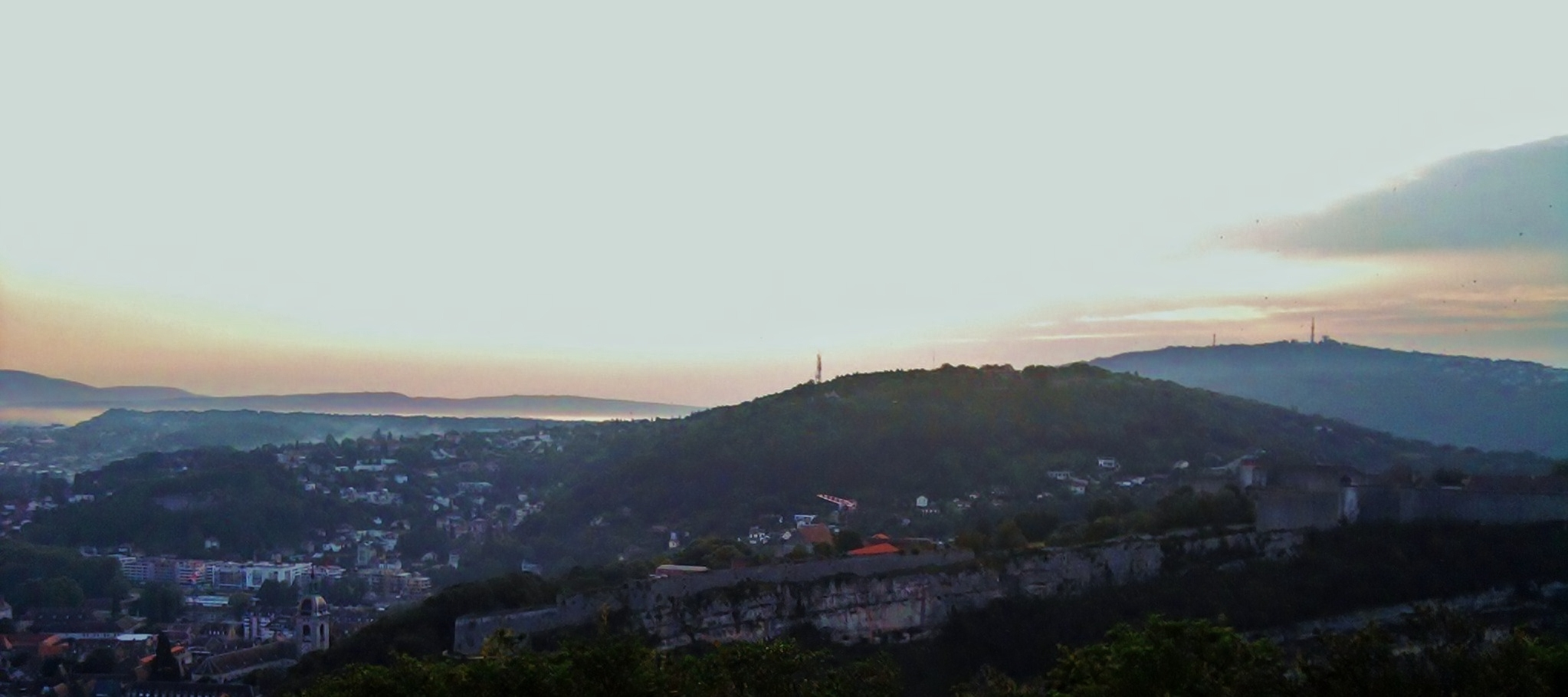 Colline de Bregille à Besançon (Doubs, France).